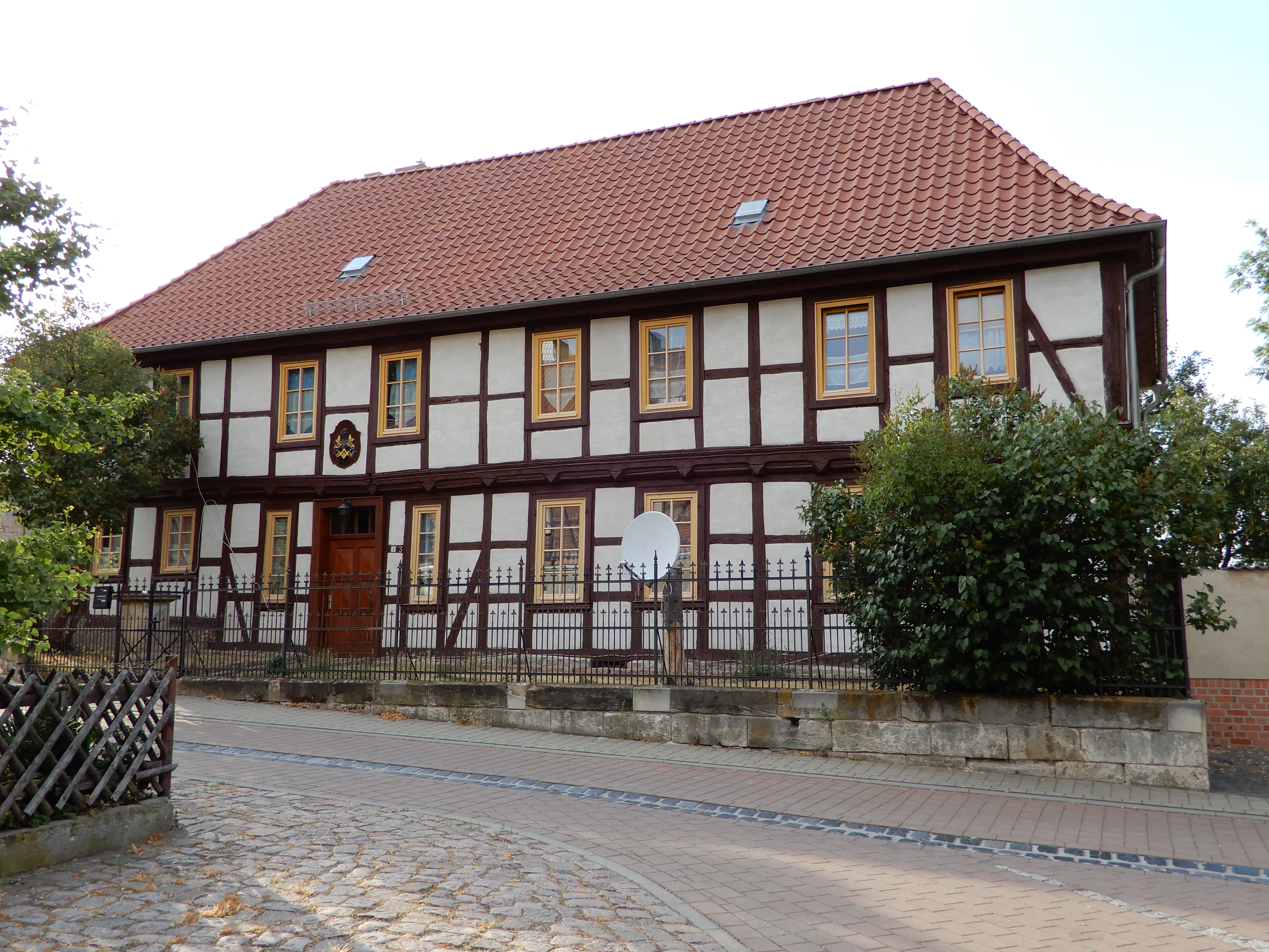 Pfarrhaus Kirchgasse